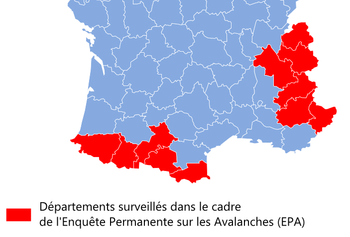 Carte des départements français surveillés dans le cadre de l'enquête permanente sur les avalanches (EPA).